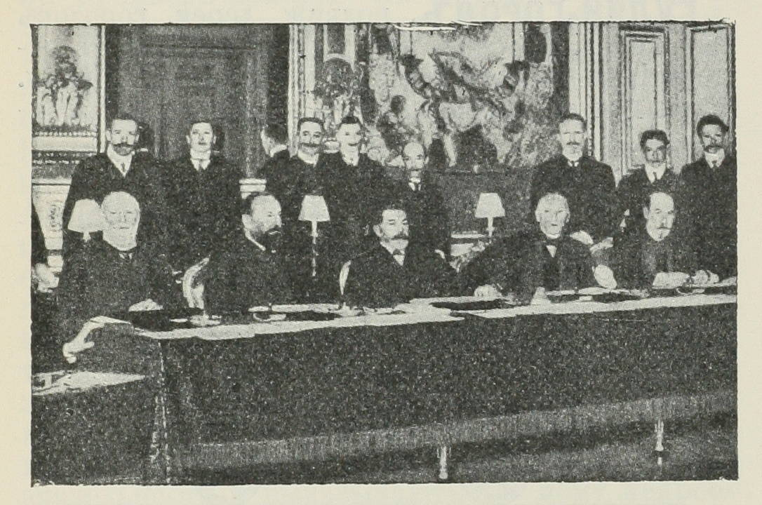 МЕЖДУНАРОДНАЯ ПАРИЖСКАЯ КОНФЕРЕНЦІЯ ПО ГУЛЛЬСКОМУ ИНЦИДЕНТУ. 1-й рядъ (сидящіе) — считая съ лѣвой стороны: 1. Бомонъ. 2. Шпаунъ. 3. Фурнье. 4. Дубасовъ. 5. Девисъ. Это изо было использовано в статье «Гулльский инцидент» опубликованной в восьмом томе «Военной энциклопедии», который был издан книгоиздательским товариществом И. Д. Сытина в 1912 году в столице Российской империи городе Санкт-Петербурге.